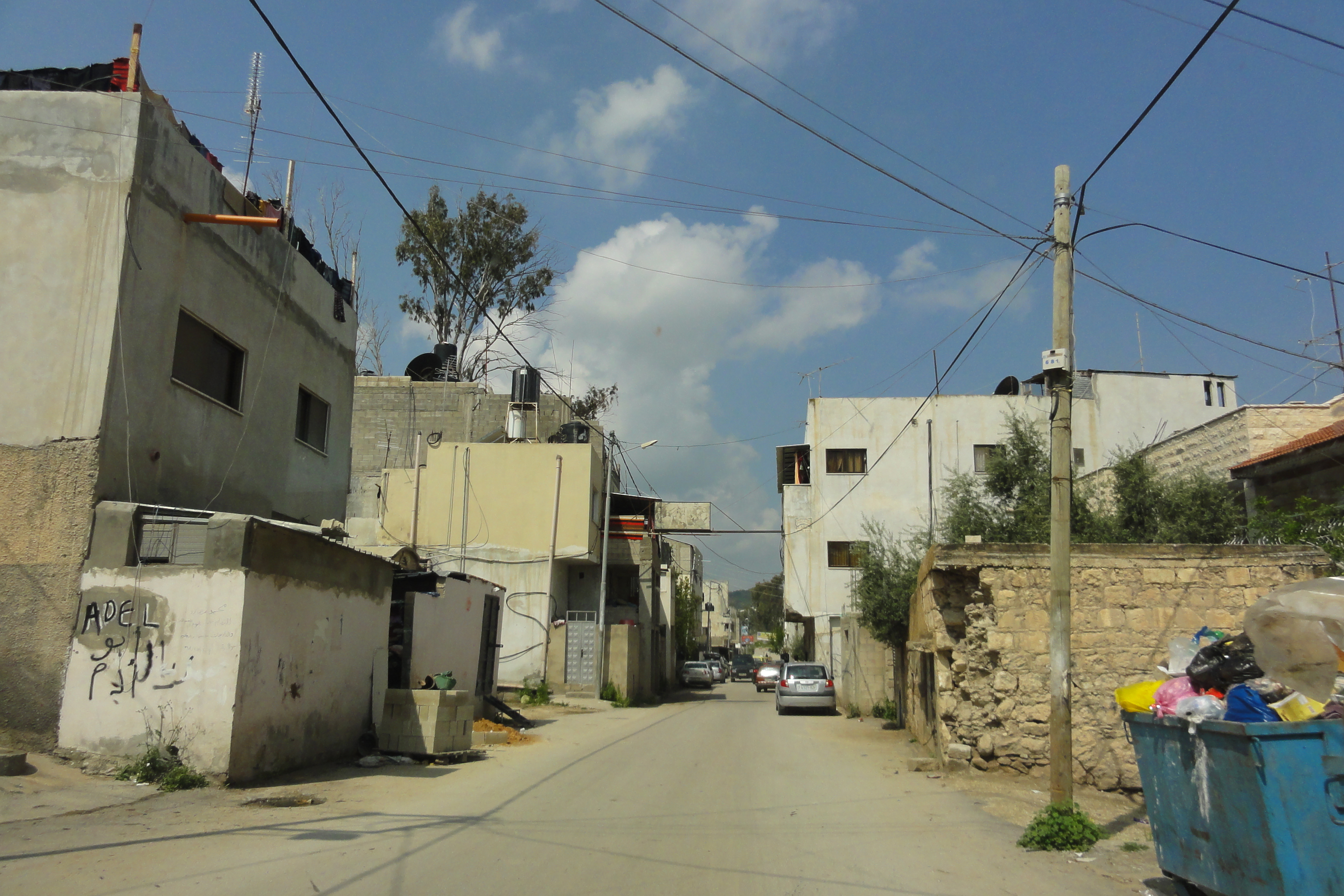 Jenin RC